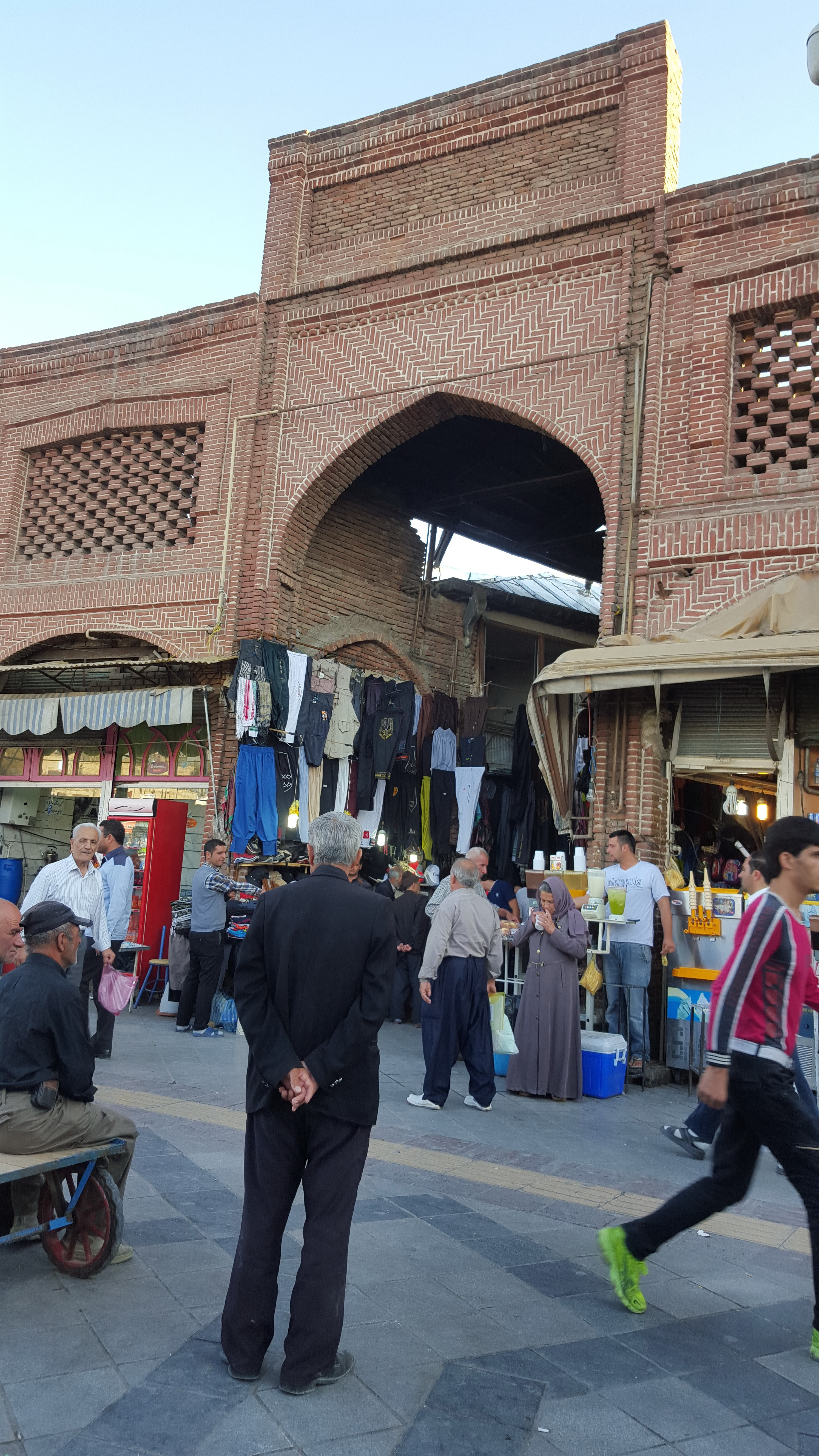 بازار سنتی ارومیه